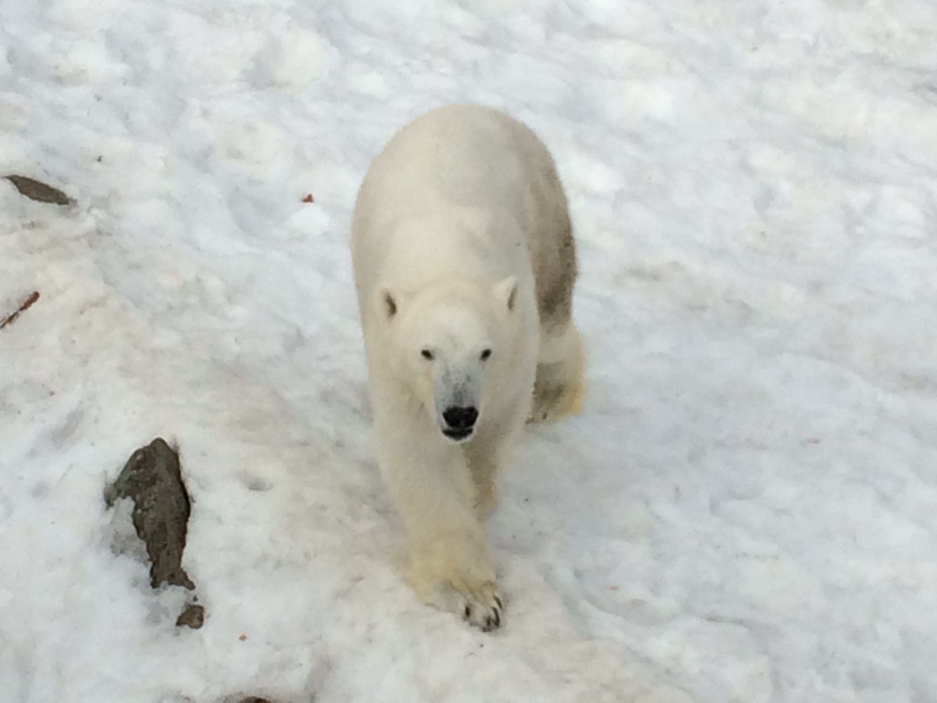 Jääkarhu Ranuan eläinpuistossa.